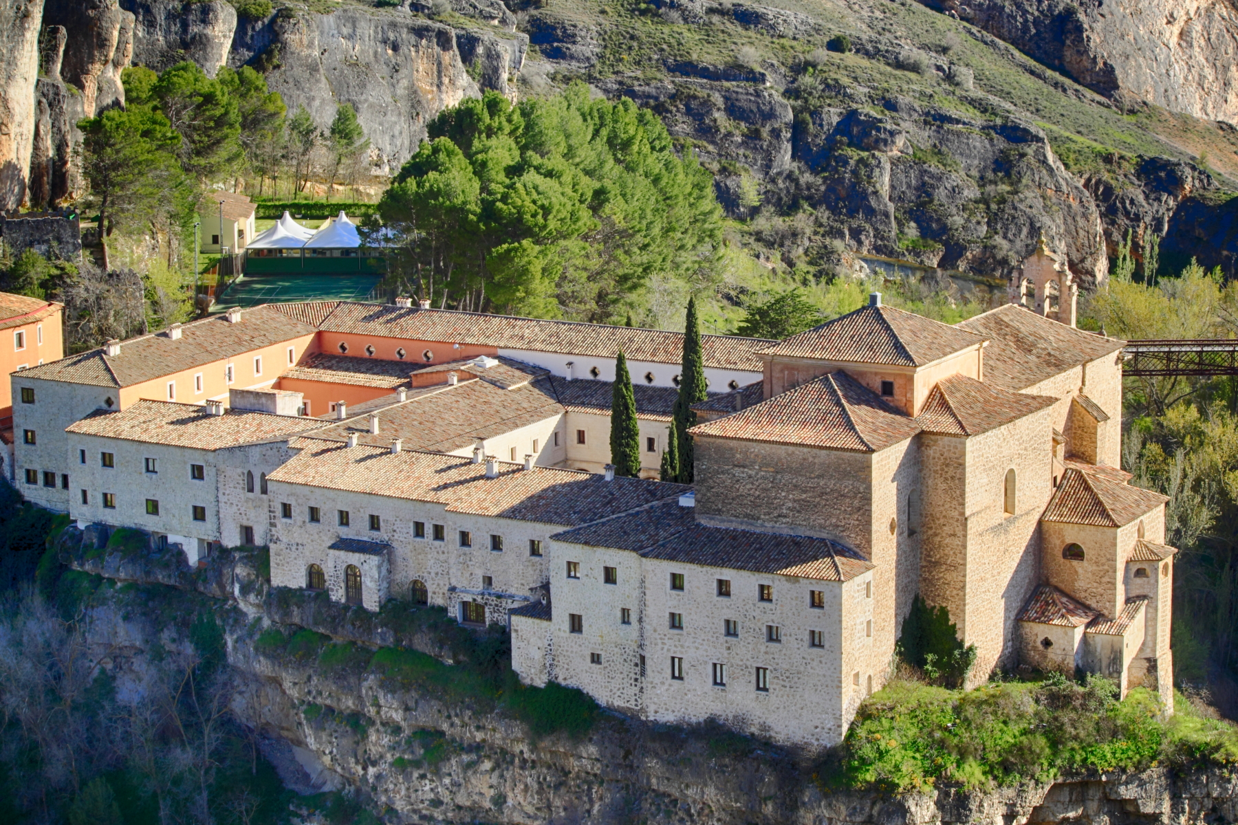 Parador de Turismo, antiguo Convento de San Pablo. Siglo XVI Cuenca Provincia de Cuenca Castilla-La Mancha España